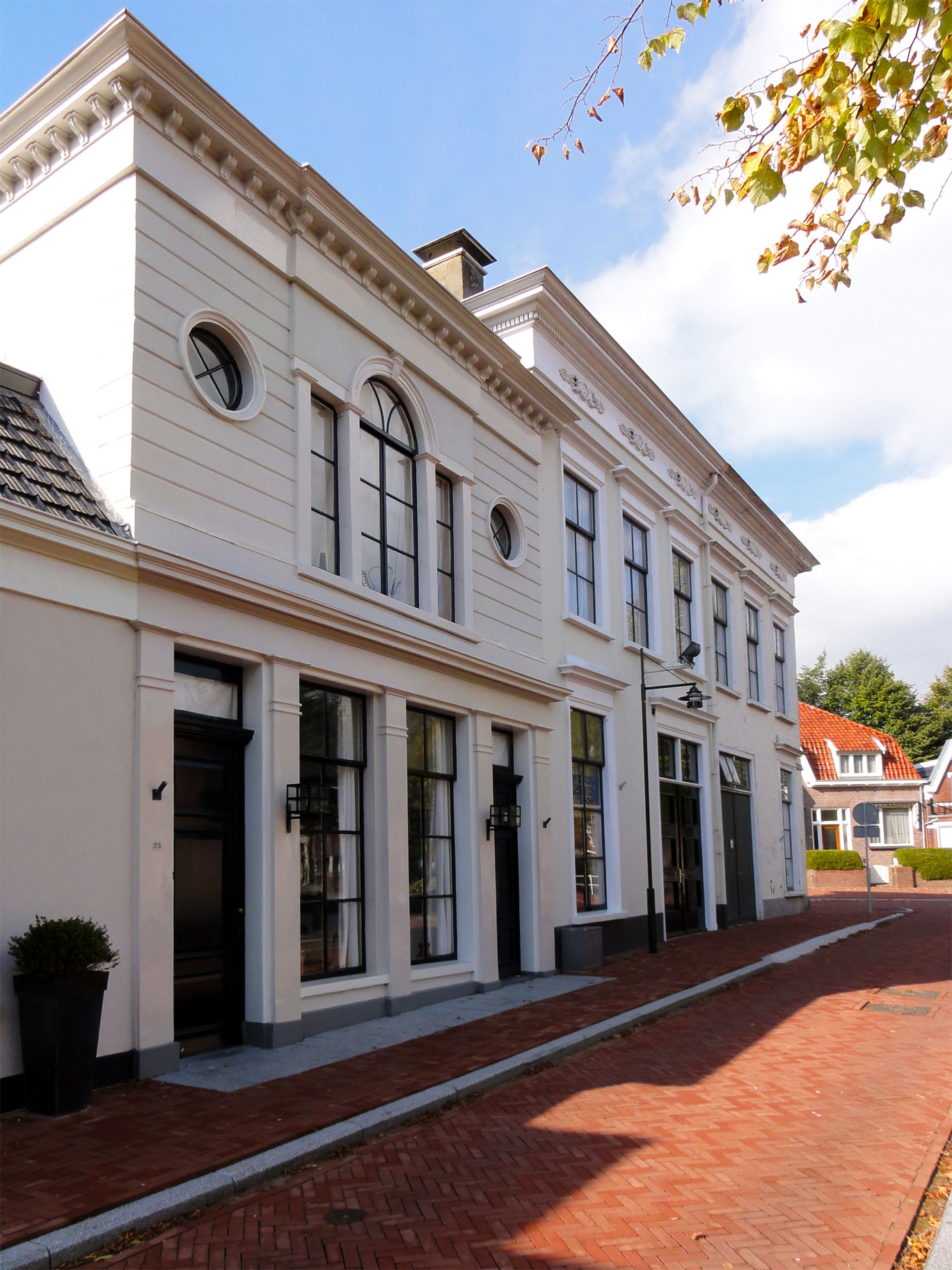 Westersingel 35 Dokkum, rijksmonument